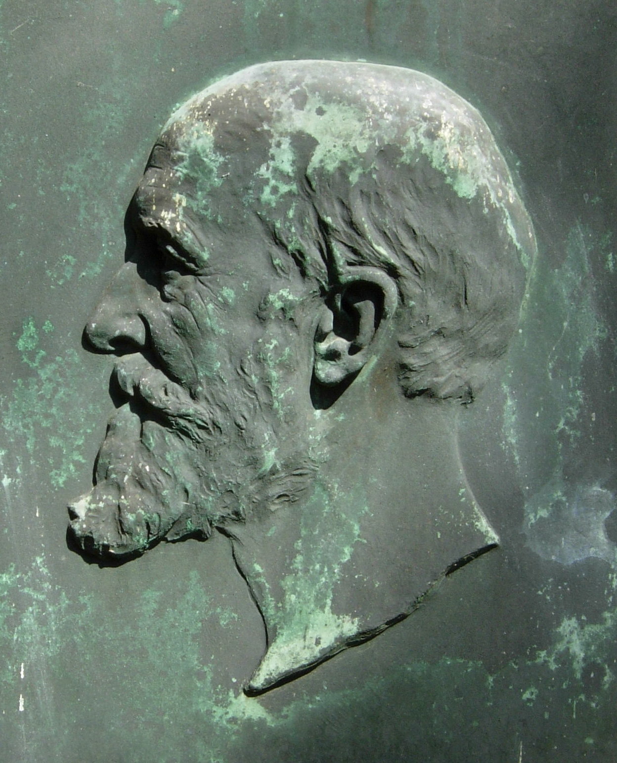 Albert Küppers: Bronze-Relief (1912) des Althistorikers Heinrich Nissen (1839 – 1912) auf dem Poppelsdorfer Friedhof in Bonn